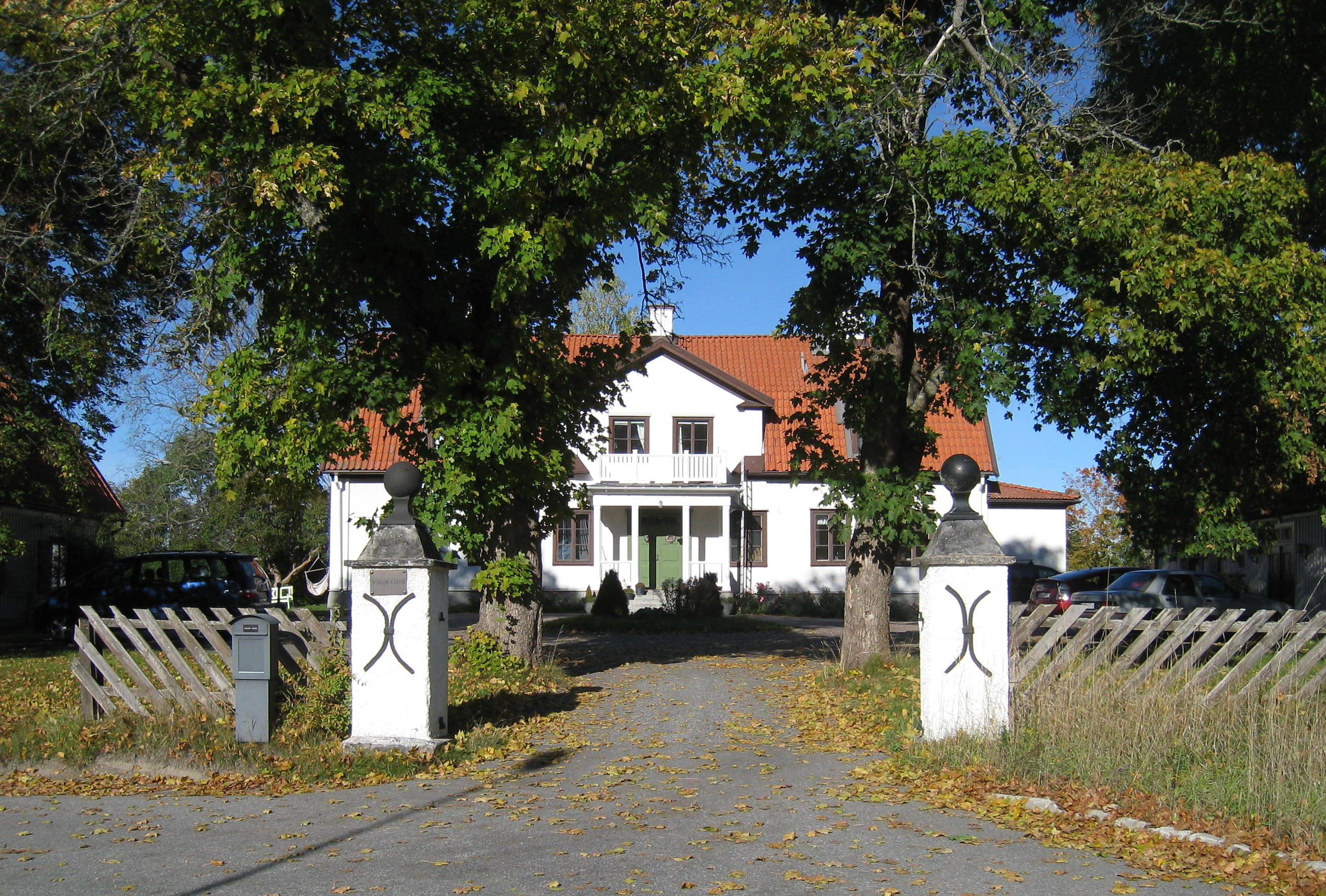 Viksjö gård, Järfälla kommun, mangårdsbyggnaden.